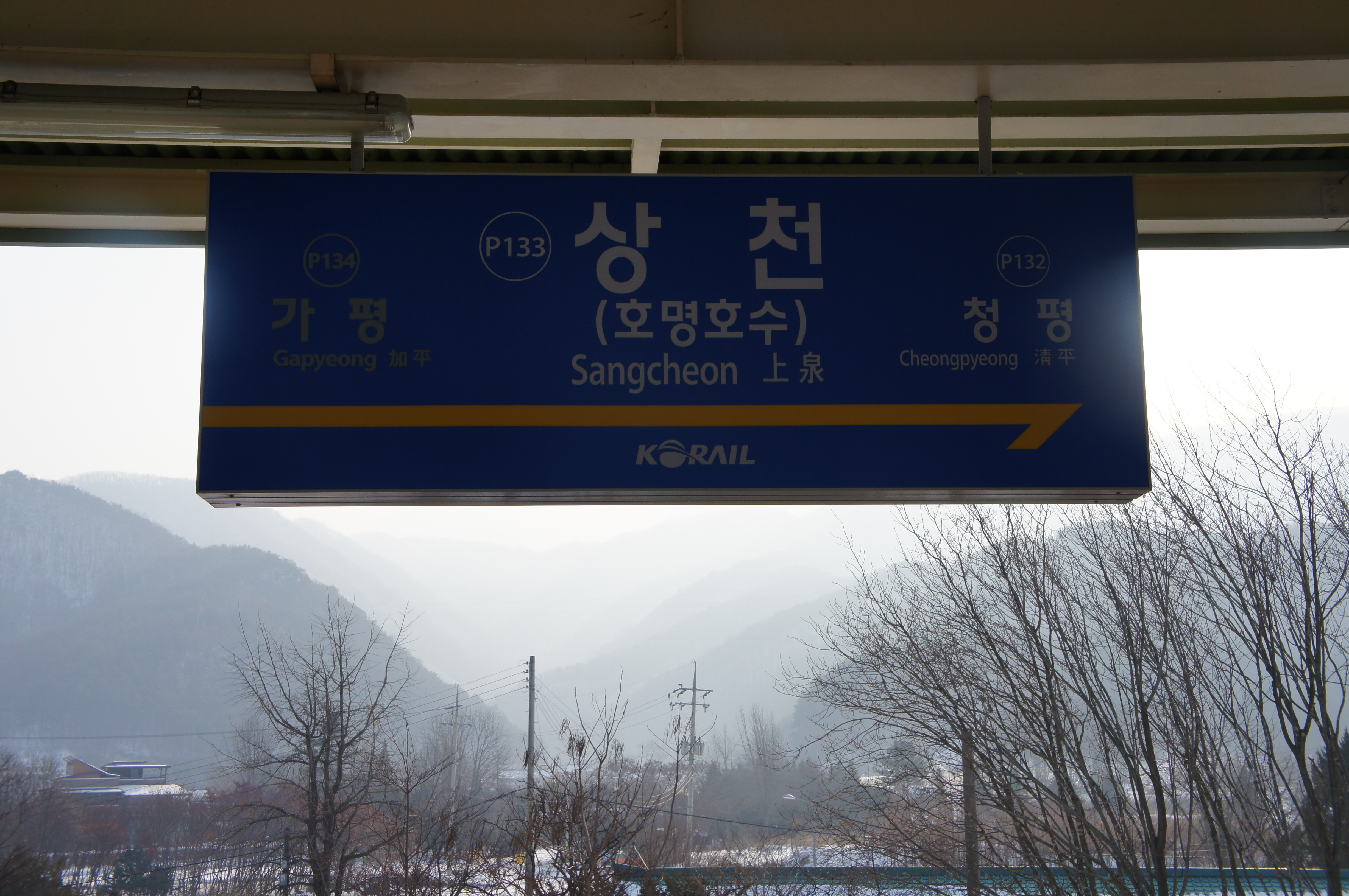 상천역 역명판